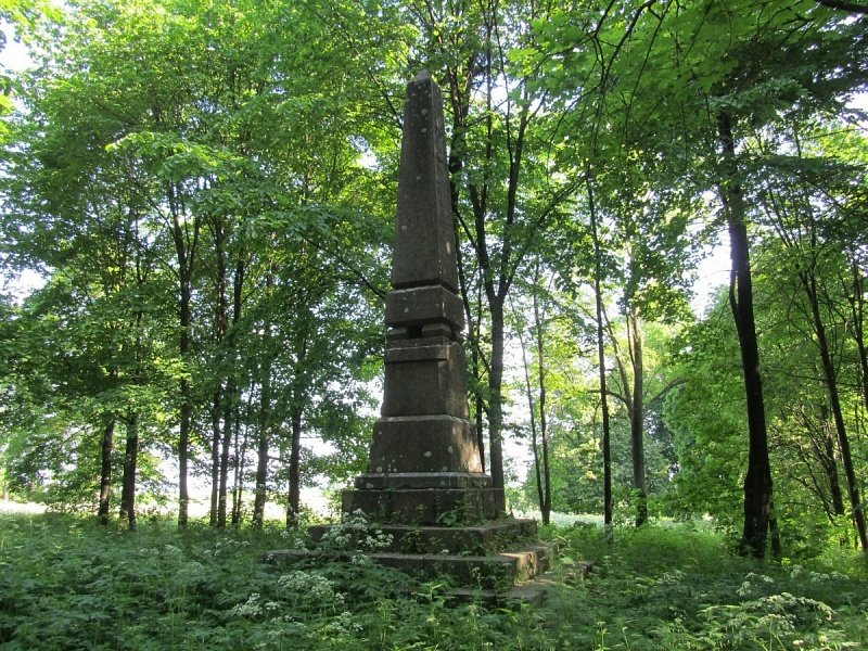 Маліноўшчына. Абеліск на магіле Міхаіла Свентаржэцкага